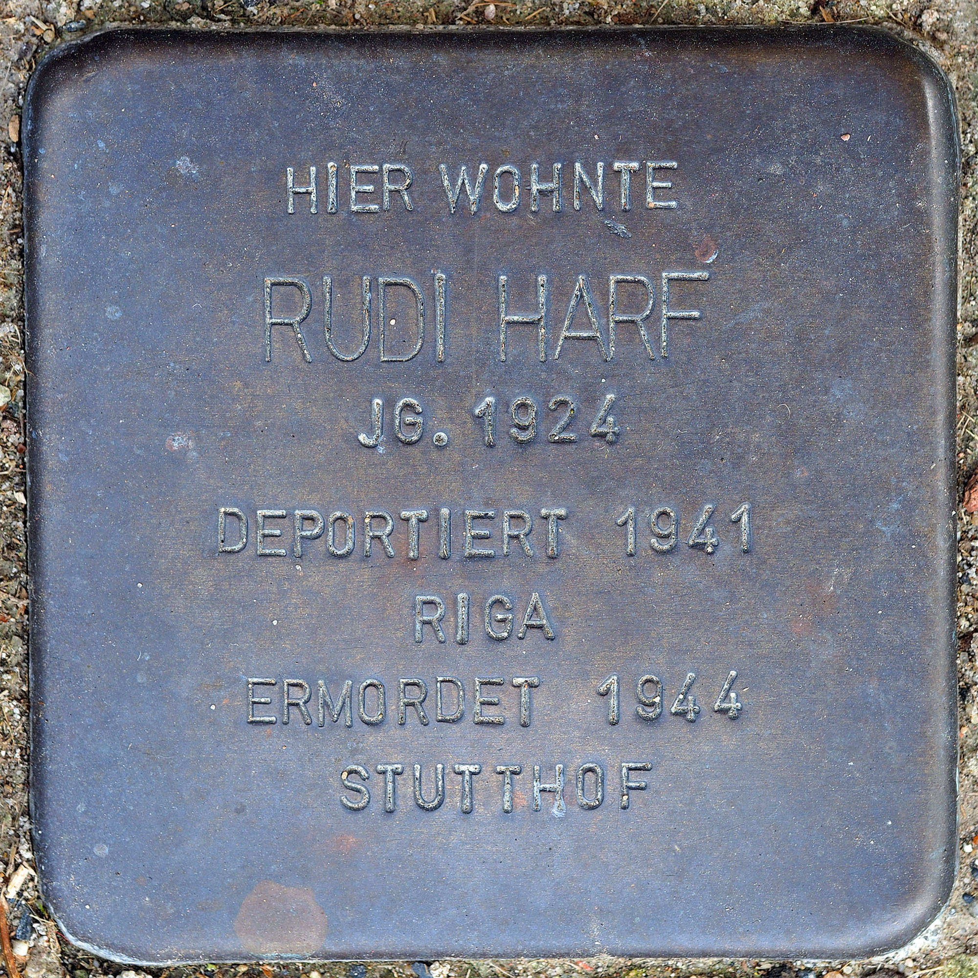 Stolpersteine MG: Harf, Rudi